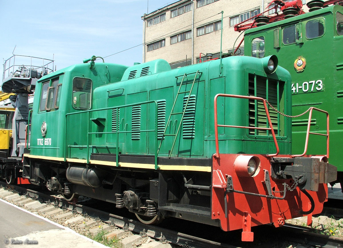 Тепловоз ТГК2-6970. Ростовский музей железнодорожного транспорта СКЖД